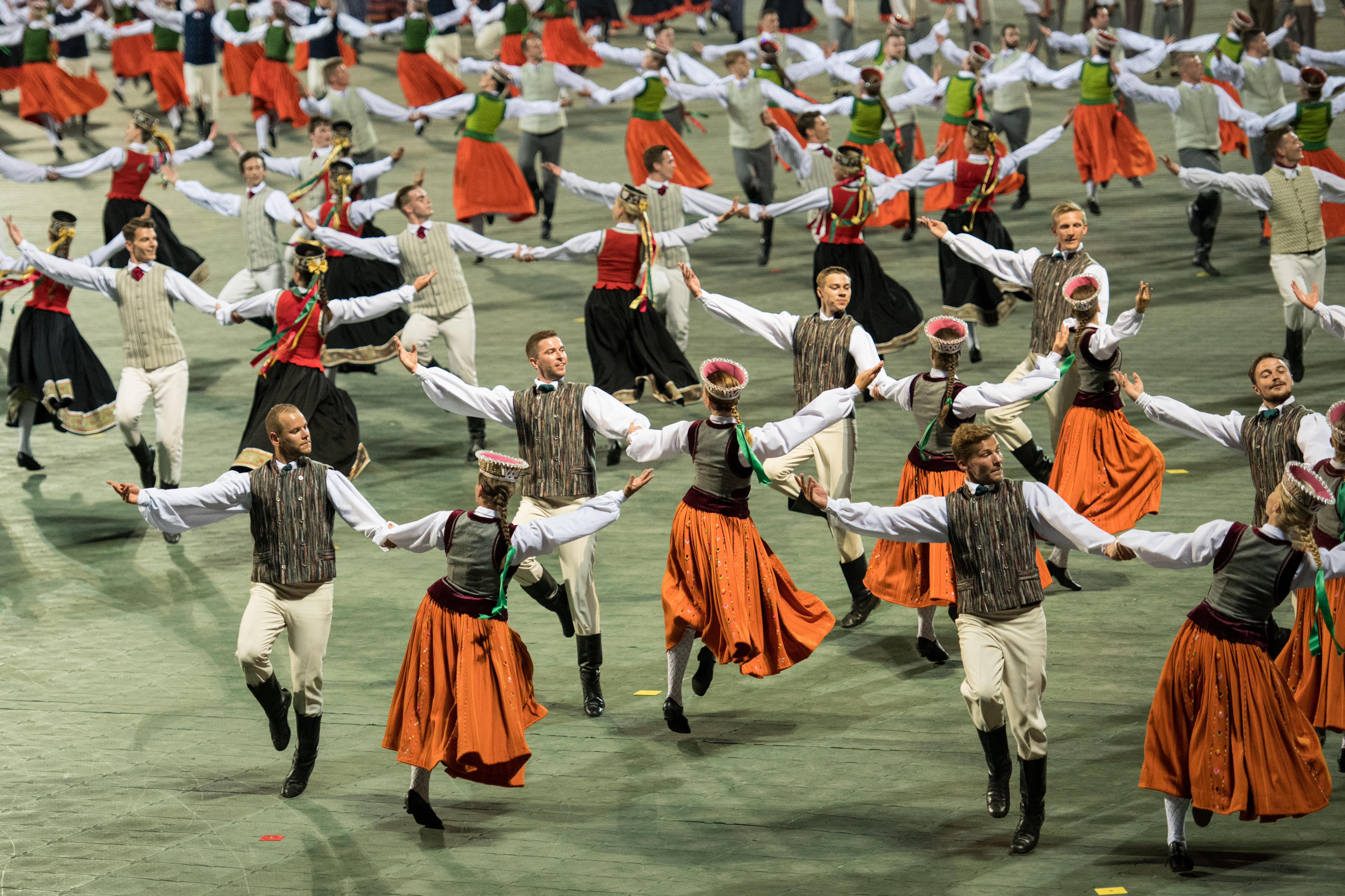 2018.gada 7.jūlijs. Deju lieluzvedums „Māras zeme”. Foto: Ieva Ābele, Saeima Izmantošanas noteikumi: saeima.lv/lv/autortiesibas